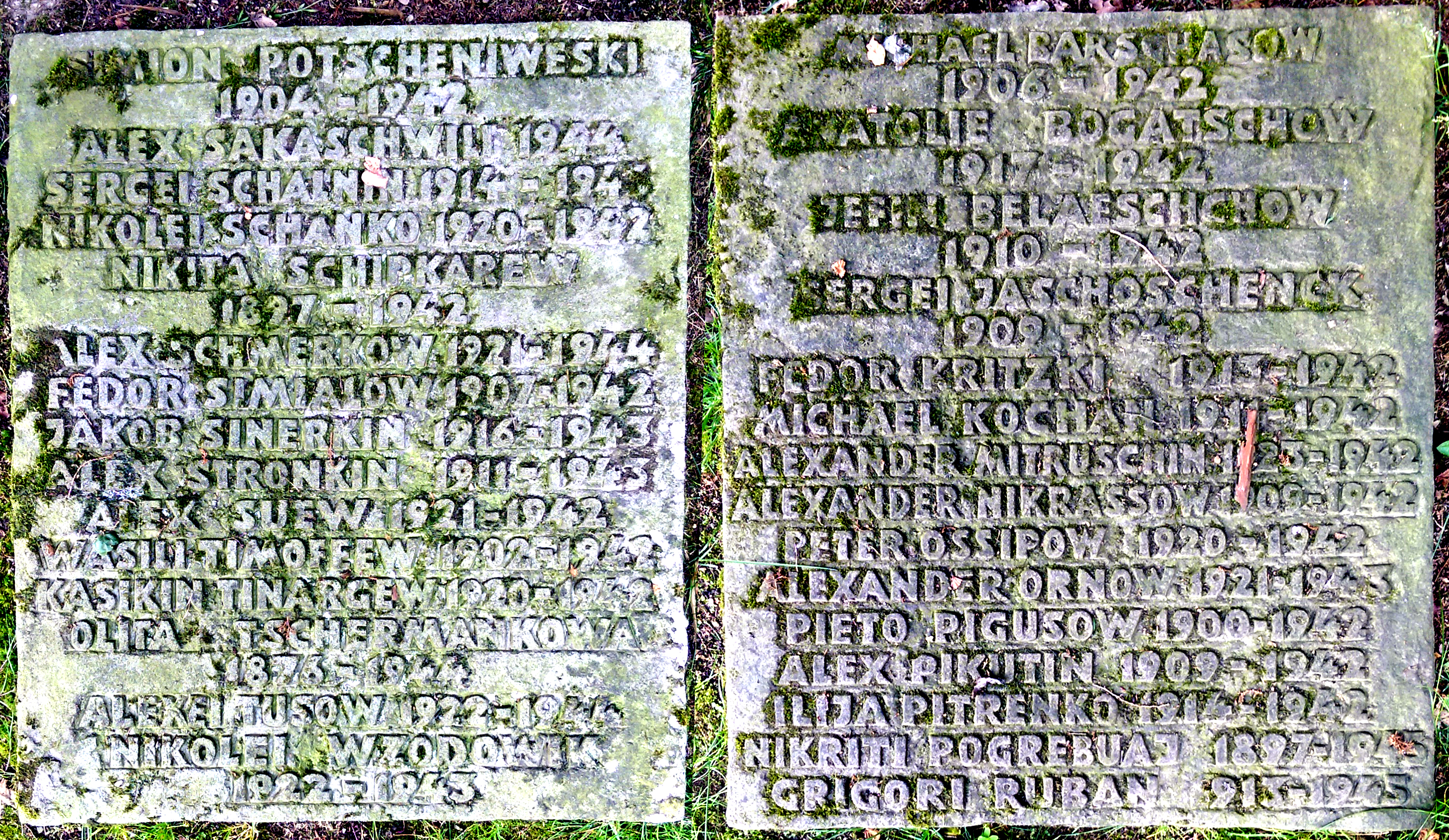 Im Zweiten Weltkrieg wurden auf dem Alten Jüdischen Friedhof in Neviges auch 30 russische Soldaten und Zivilisten beigesetzt.